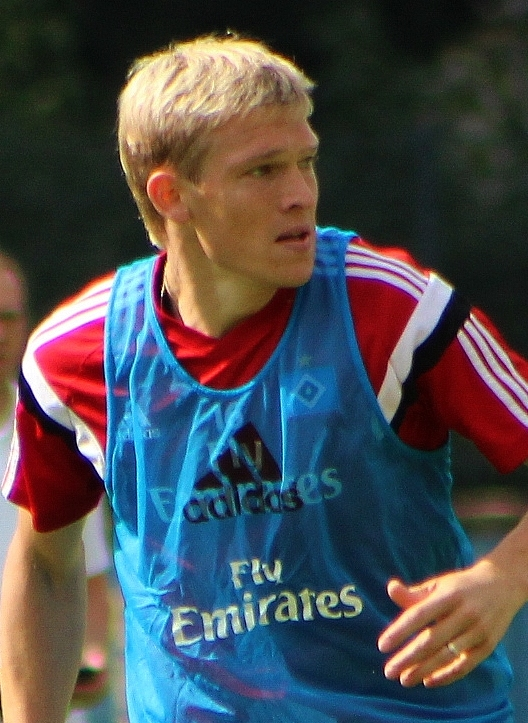 Artjoms Rudnevs beim HSV-Training am 14. August 2014.